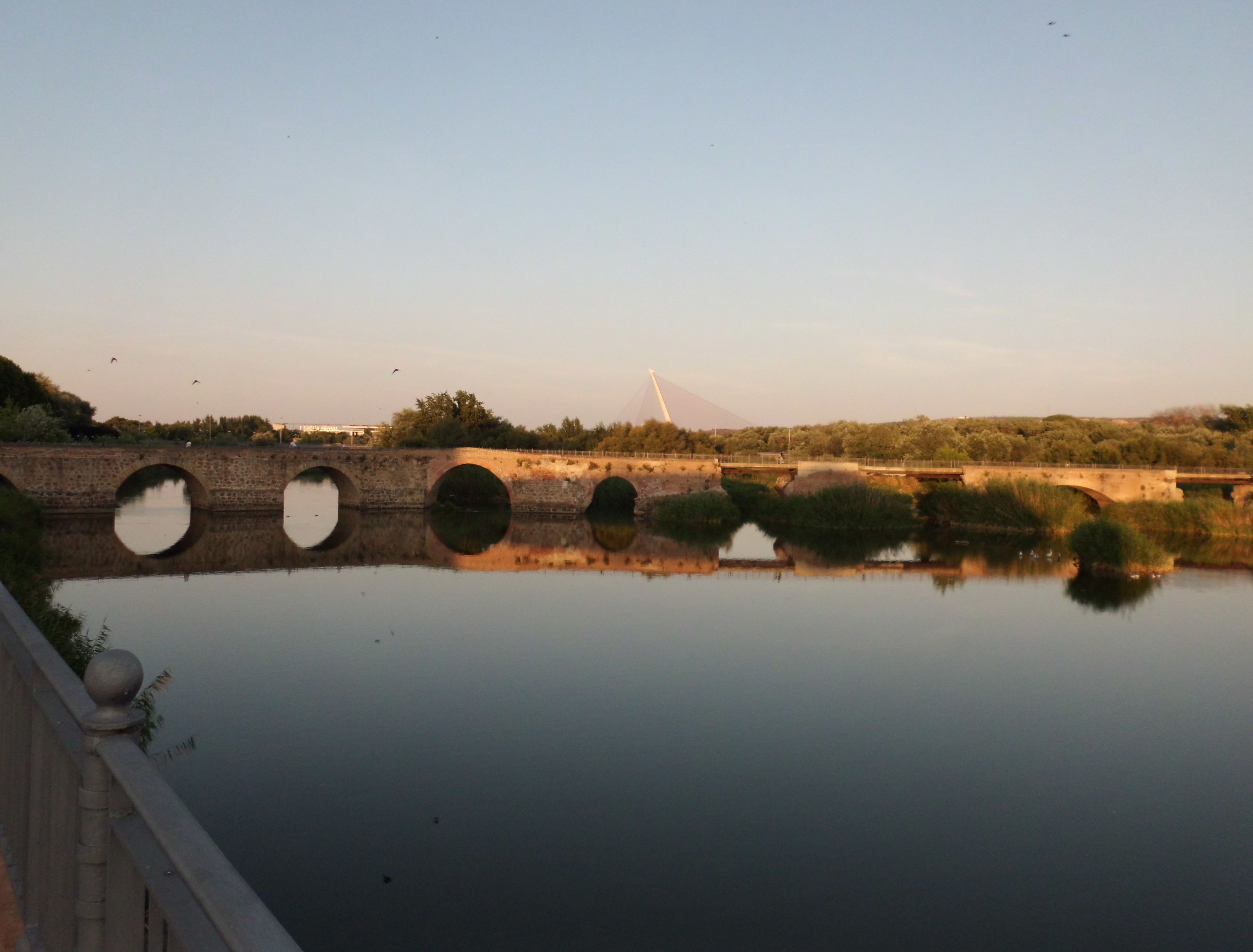 Río Tajo y Puente Viejo en Talavera de la Reina